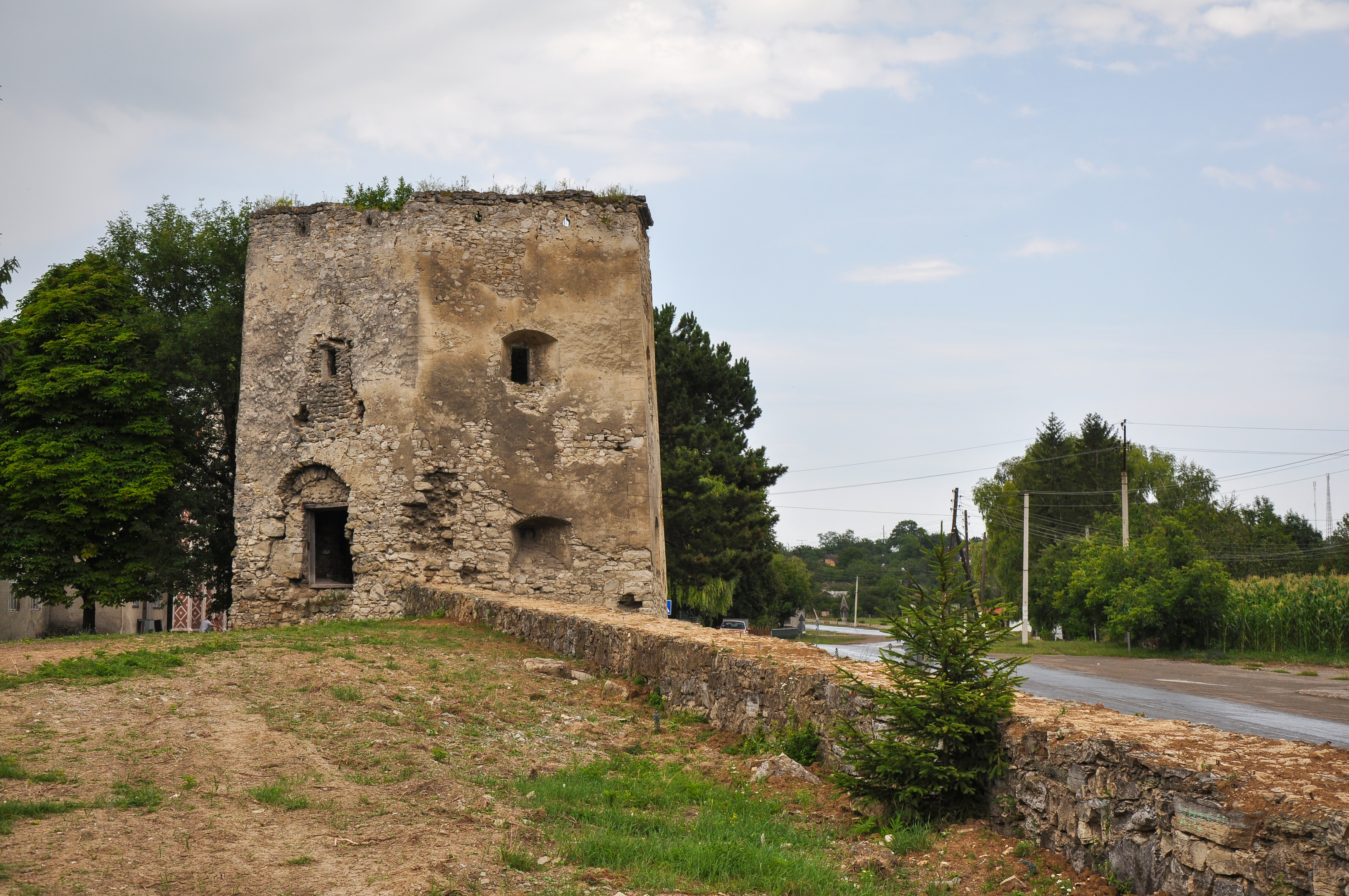 Башта південно-східна, Кривче